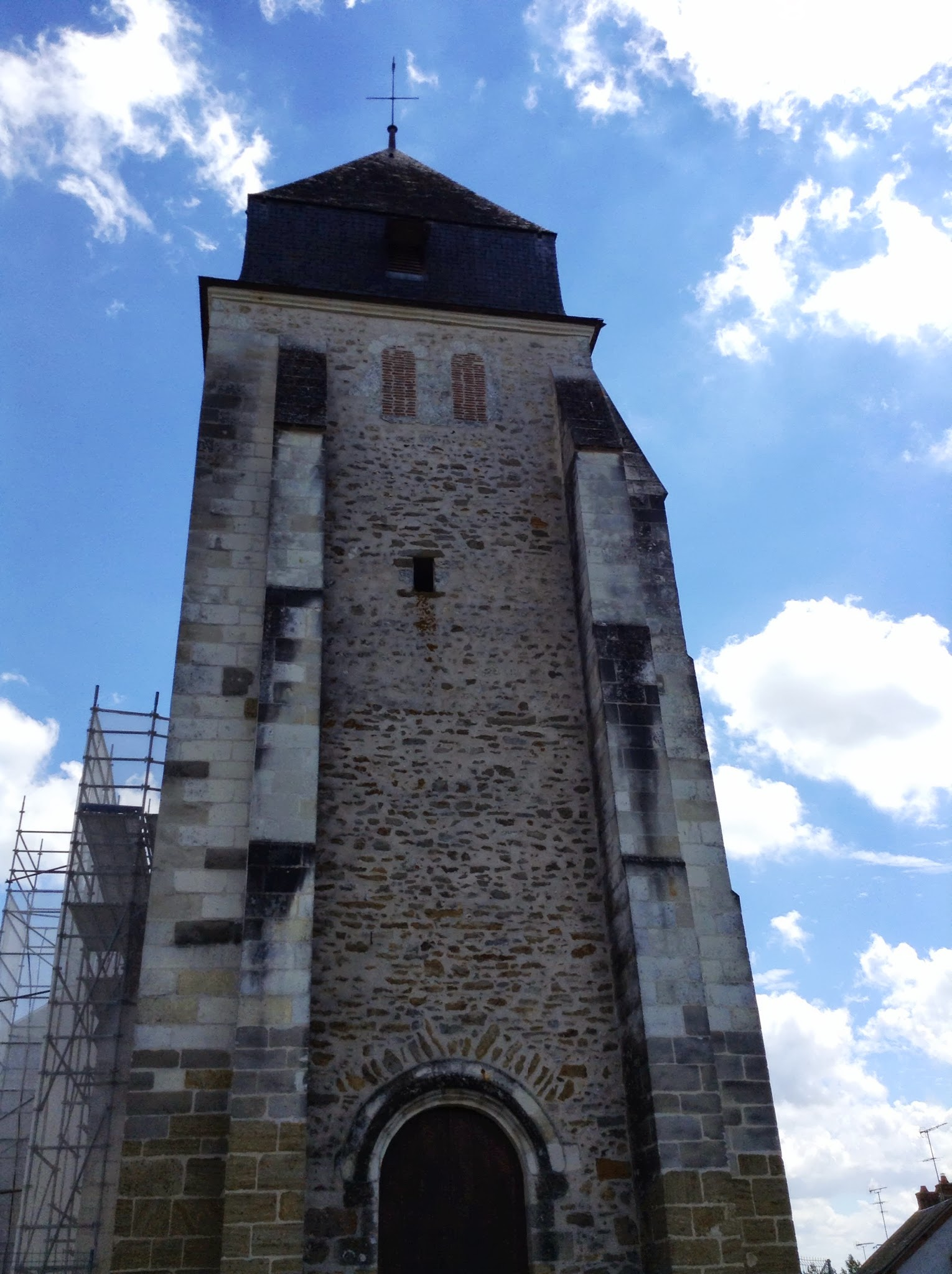 Église Saint-Sulpice de Langon (Loir-et-Cher)